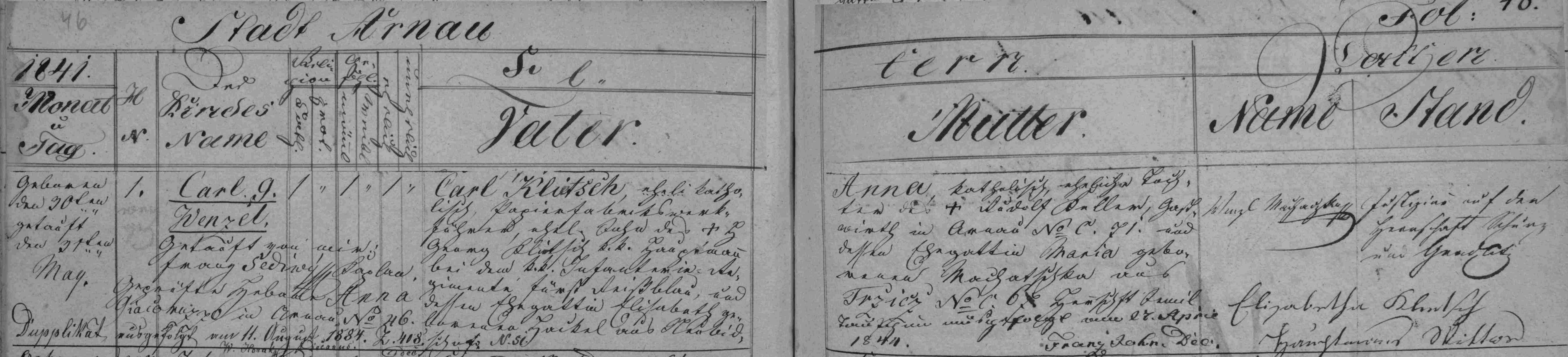 Matrika narozených města Hostinné, záznam o narození Karla Klíče